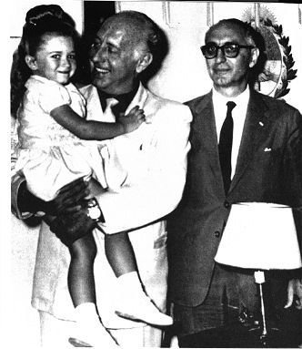 Es una foto del director del diario clarín Roberto Noble (él de blanco), junto a su hija adoptiva Luppita, atrás se encuentra Arturo Frondizi.